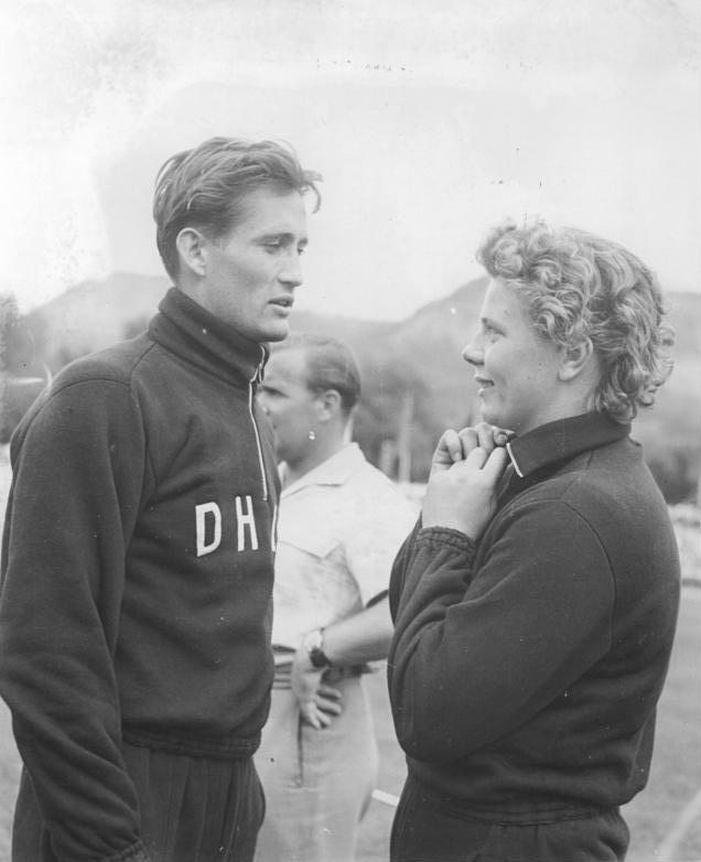 Johanna Lüttge, Heinz Meißner im Gespräch Zentralbild Wlocka-Wittig 21.07.1958 Deutsche Leichtathletikmeisterschaften 1958 in Jena18.- 20.Juli. UBz: Johanna Lüttge (SC Wissenschaft DHfK) erzielte im Kugelstoßen mit 15,43 m neuen Deutschen Rekord. Links: ihr Clubkamerad Speerwerfer Heinz Meißner, der in seiner Disziplin mit 69,85 m zweiter hinter Klaus Frost wurde.